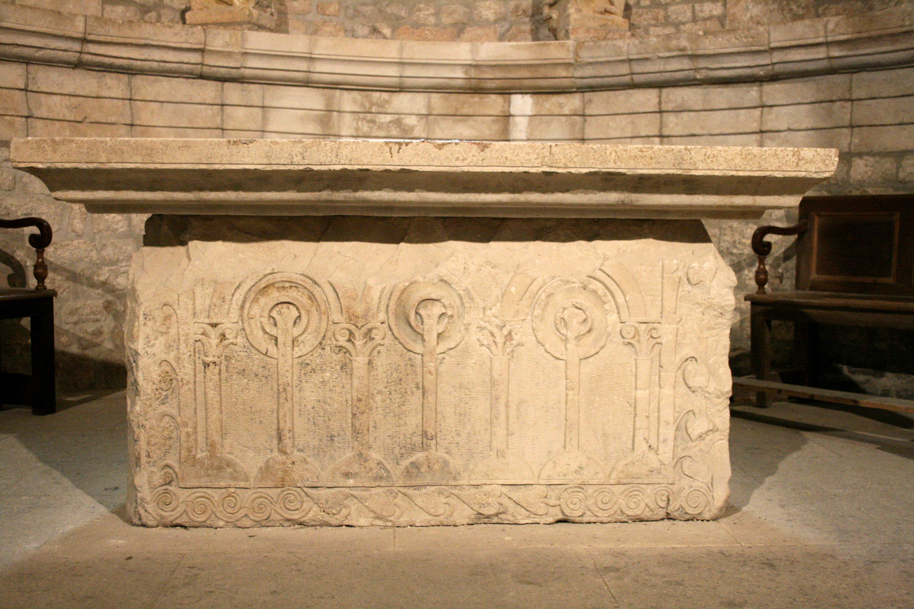 Saint-Christol (Vaucluse, France), église Notre-Dame-et-Saint-Christophe, autel roman.